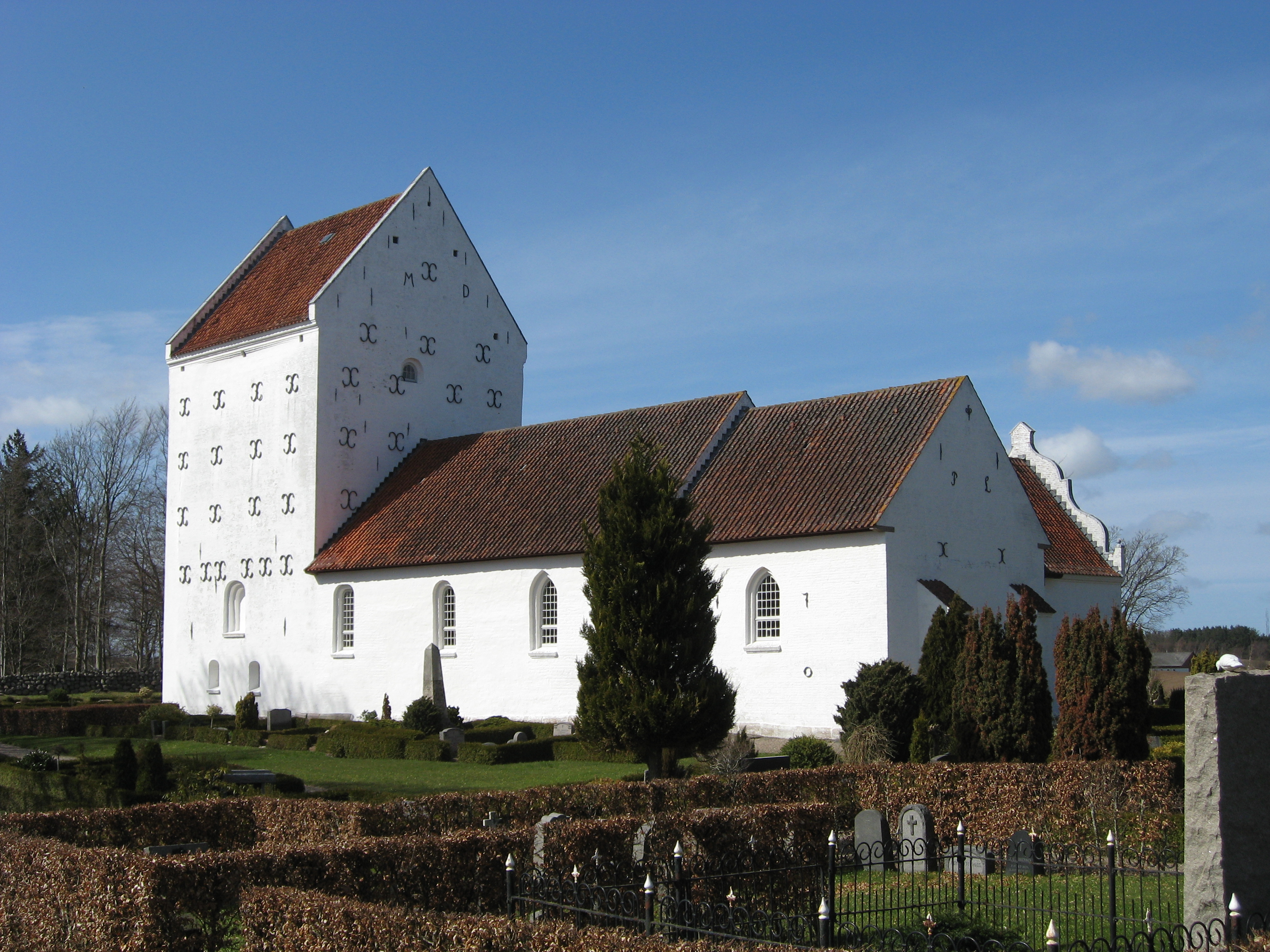 Aasted Kirke, Aasted Sogn (Frederikshavn Kommune)